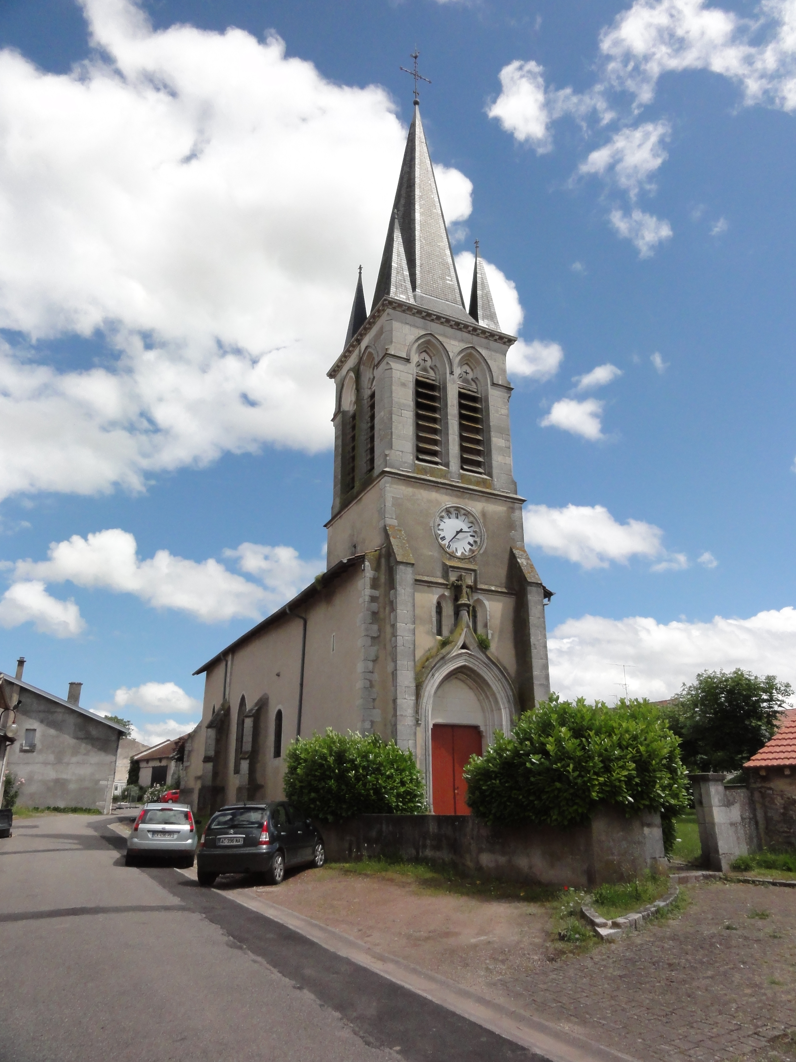 Azelot (M-et-M) église MH .